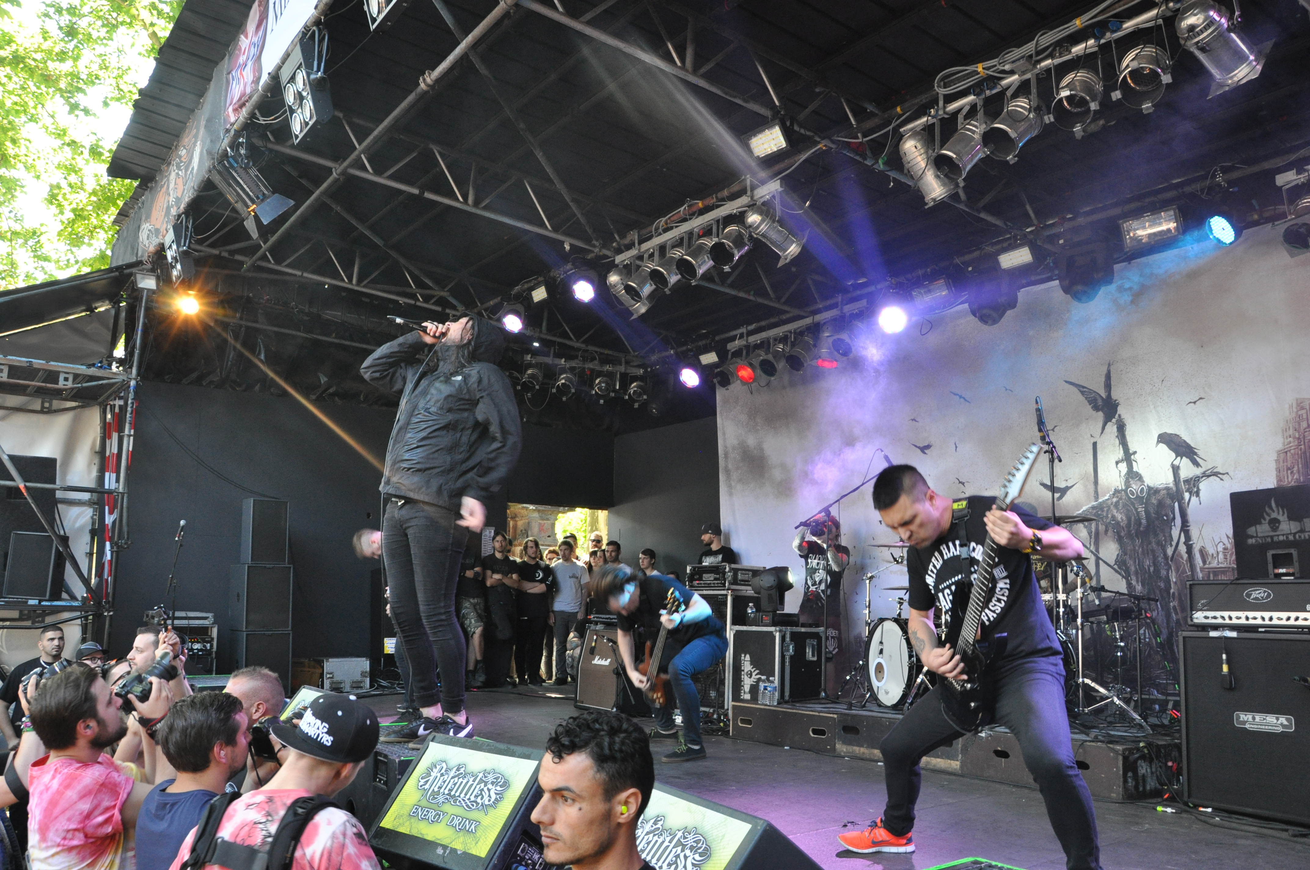 Thy Art Is Murder auf dem Summerblast Festival 2014